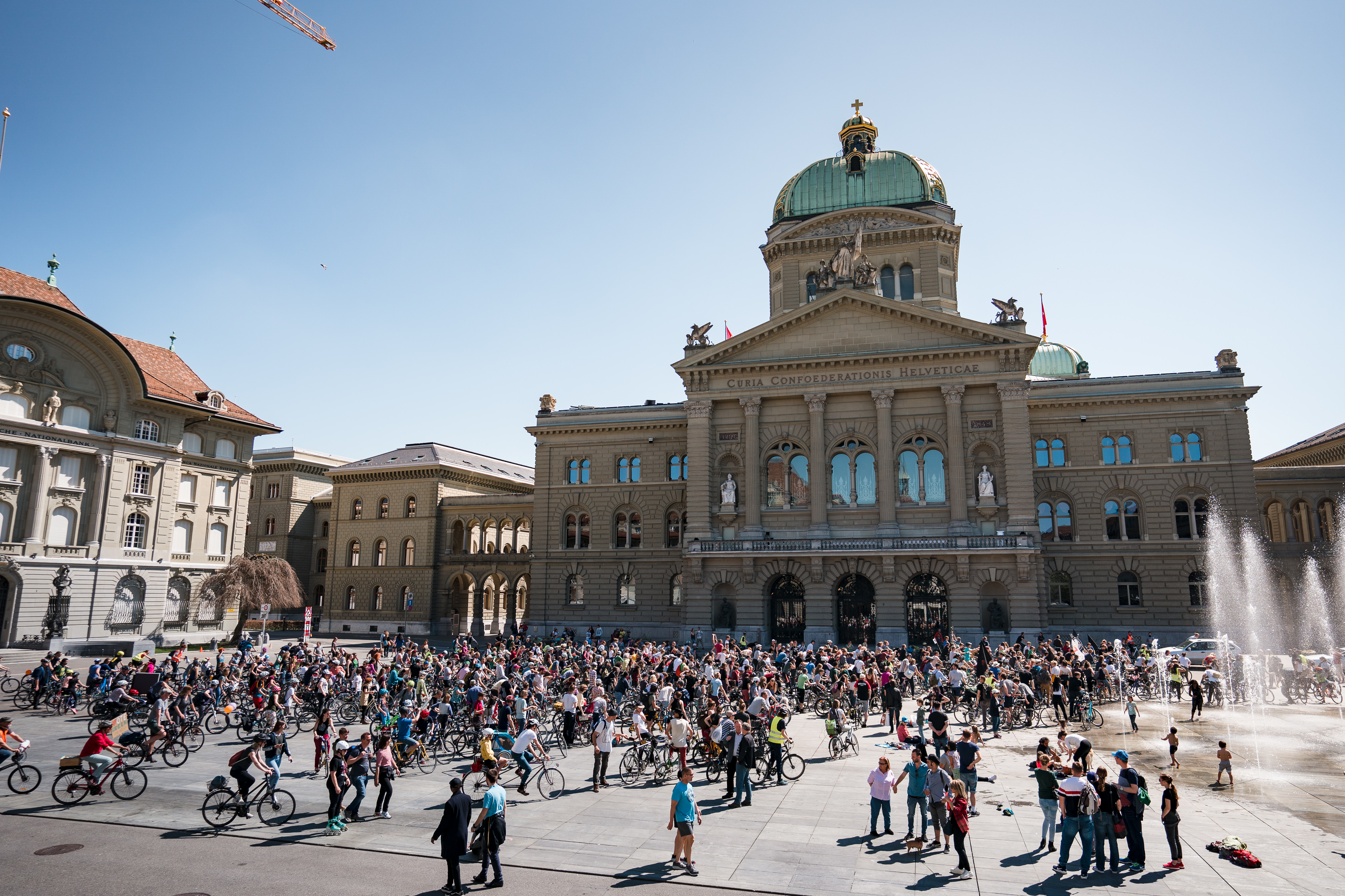 Klimastreikdemo Bern, Velodemo am 20. April 2019 mit rund 1000 Menschen